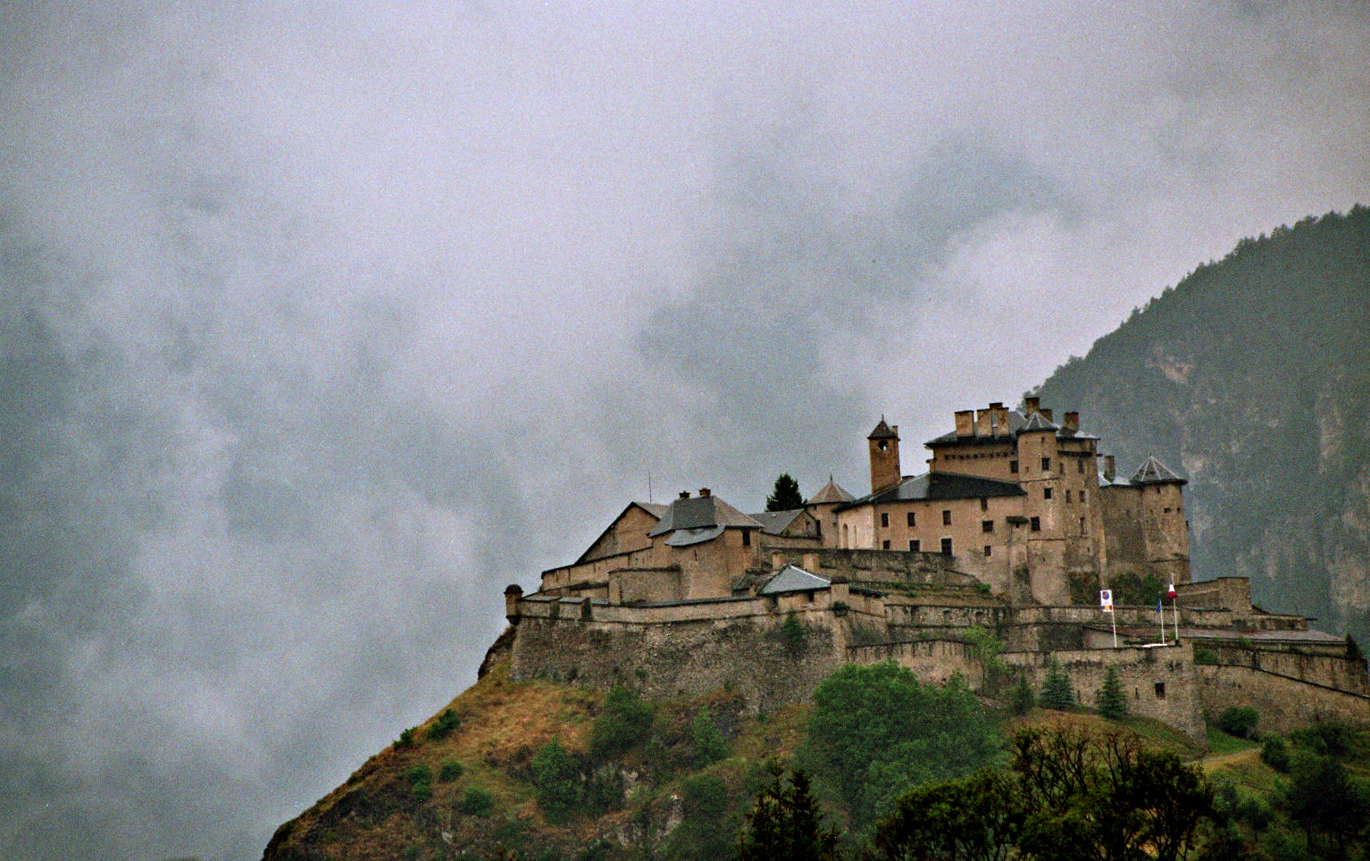 Fort Queyras, Hautes-Alpes, Provence-Alpes-Côte d’Azur, France